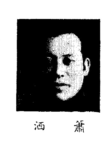 中文（中国大陆）: 制憲國民大會代表